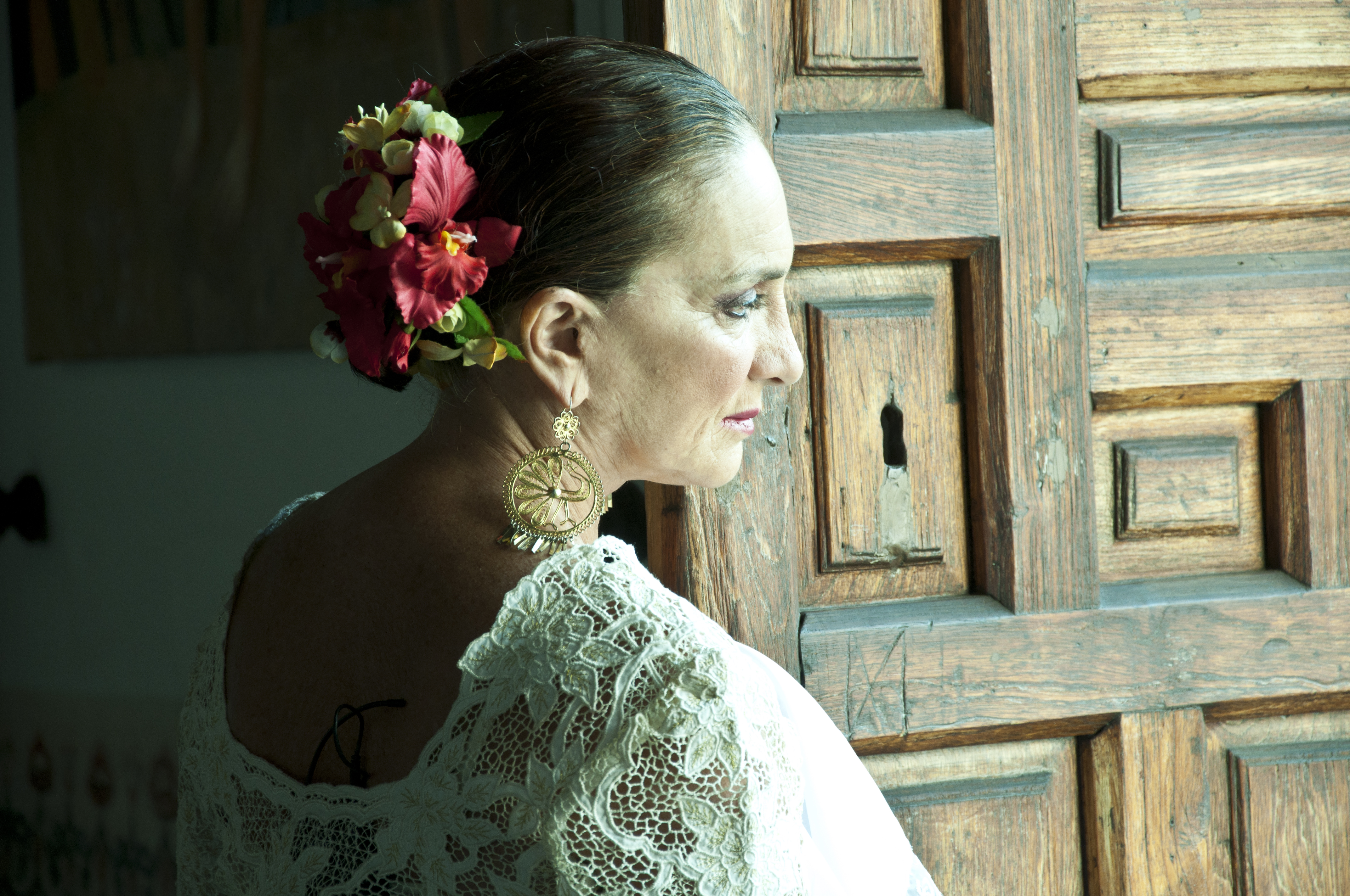 La protagonista en traje de marinera